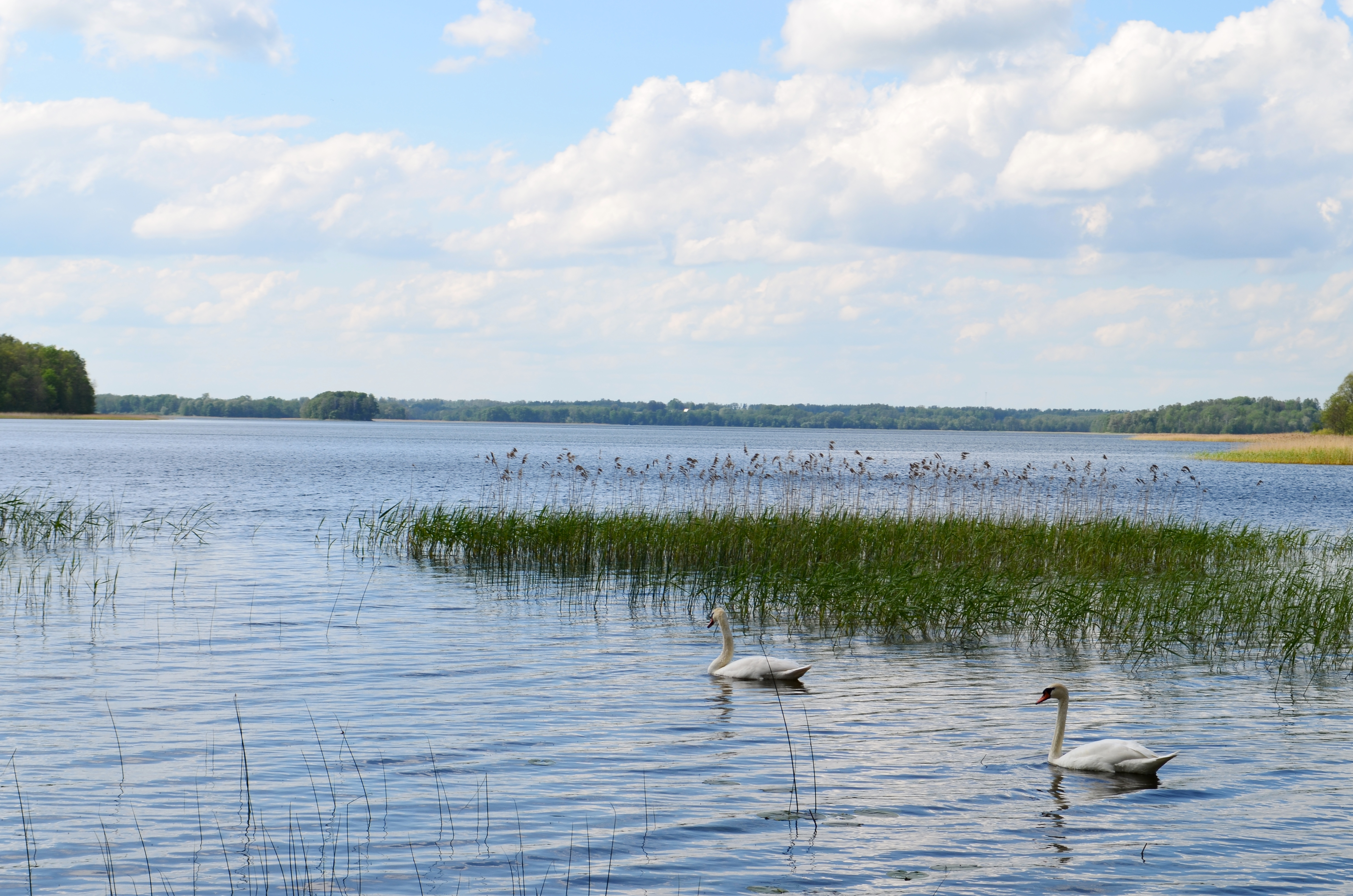 Rubikių ež. prie Mačionių, Anykščių raj.